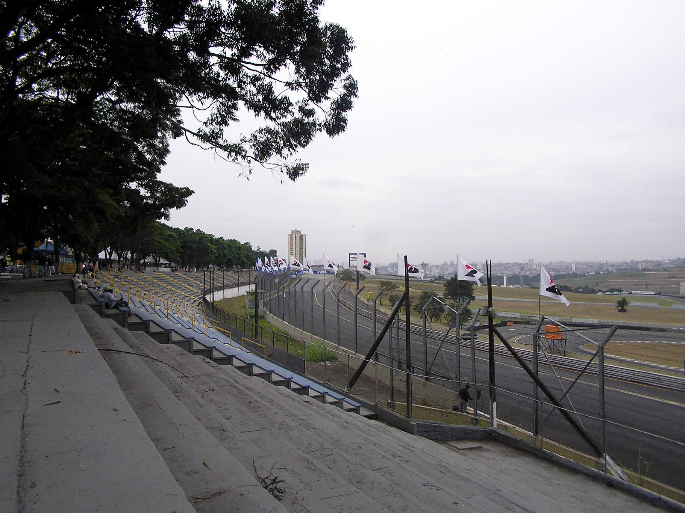 Autódromo José Carlos Pace: Arquibancadas